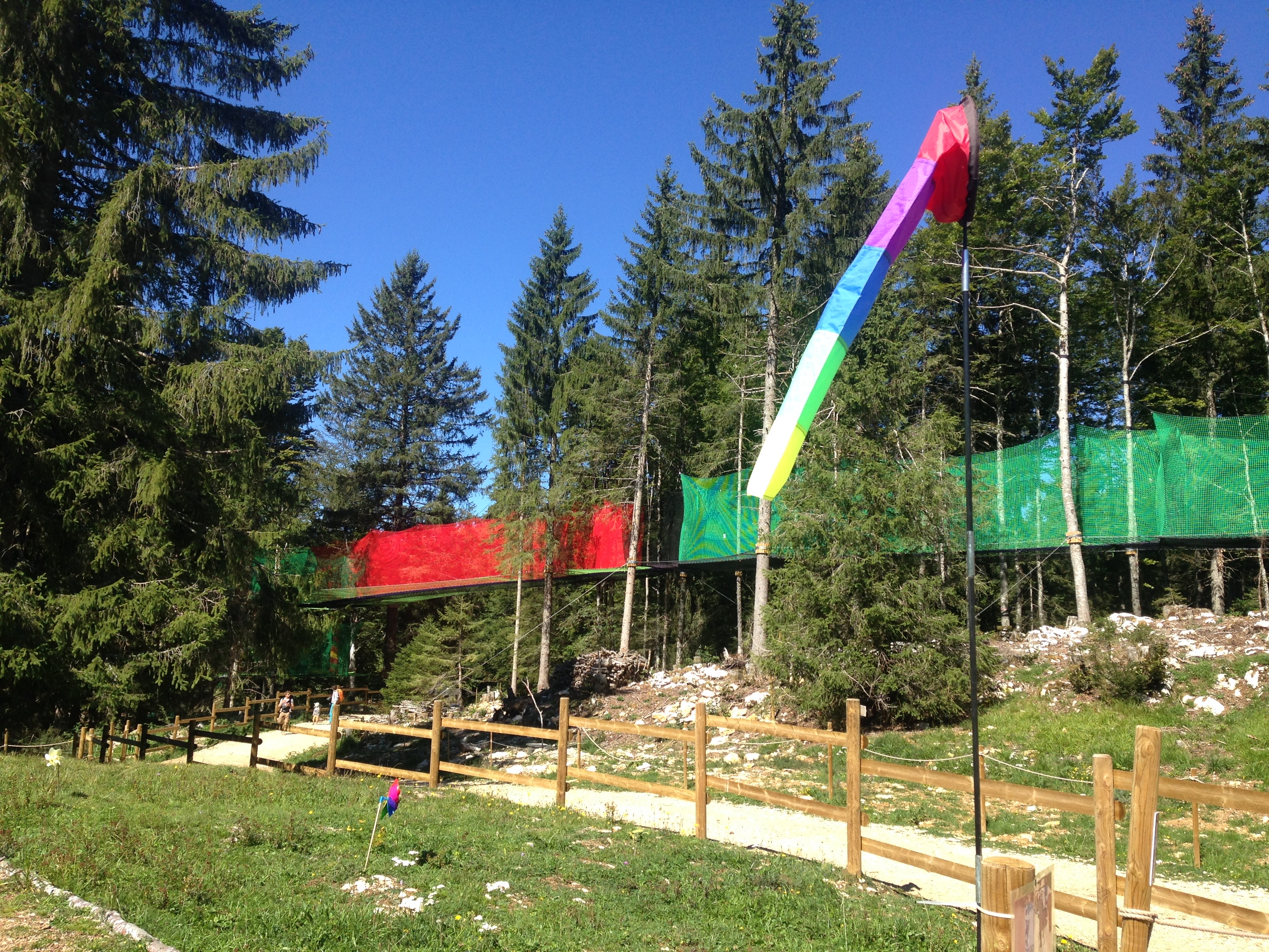 Parcabout pour jouer